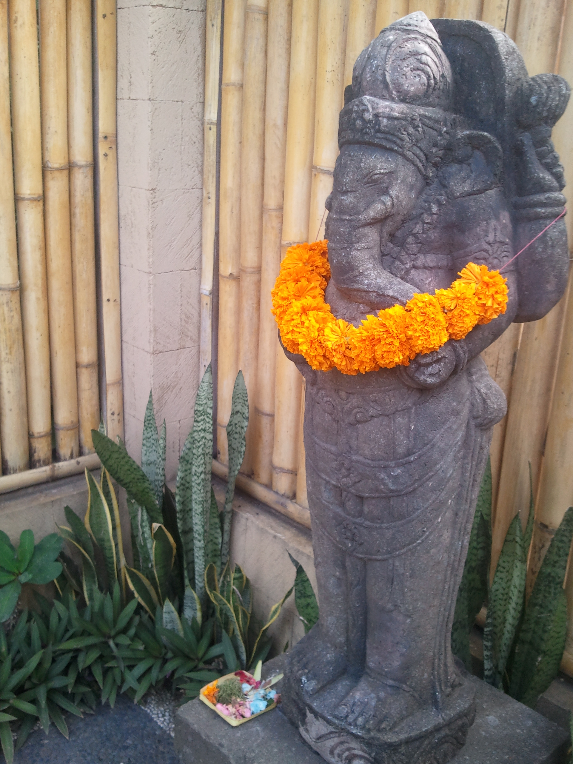 Statue, Kederi art in Bali Indonesia